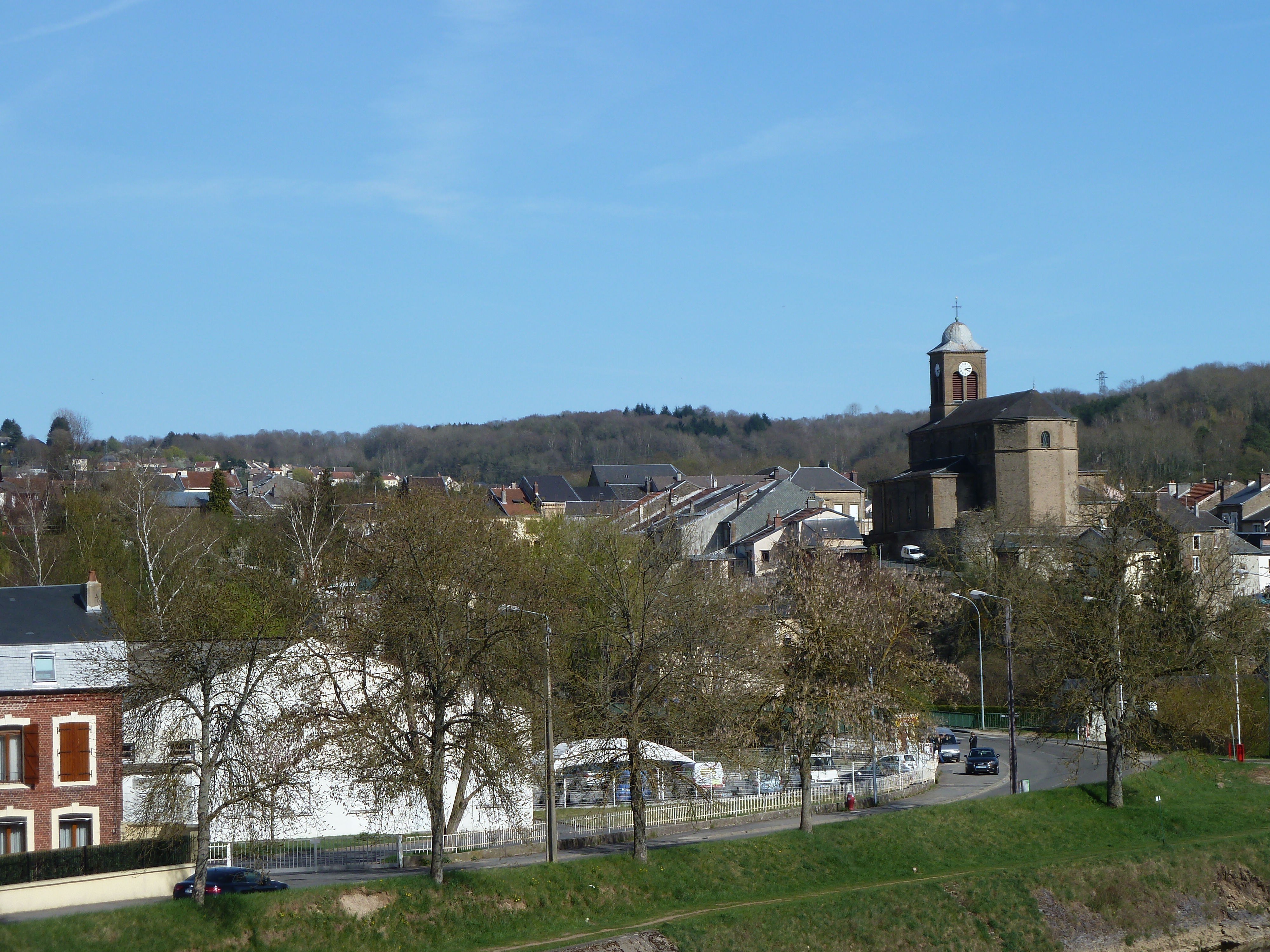 Vue de Montcy-Notre-Dame